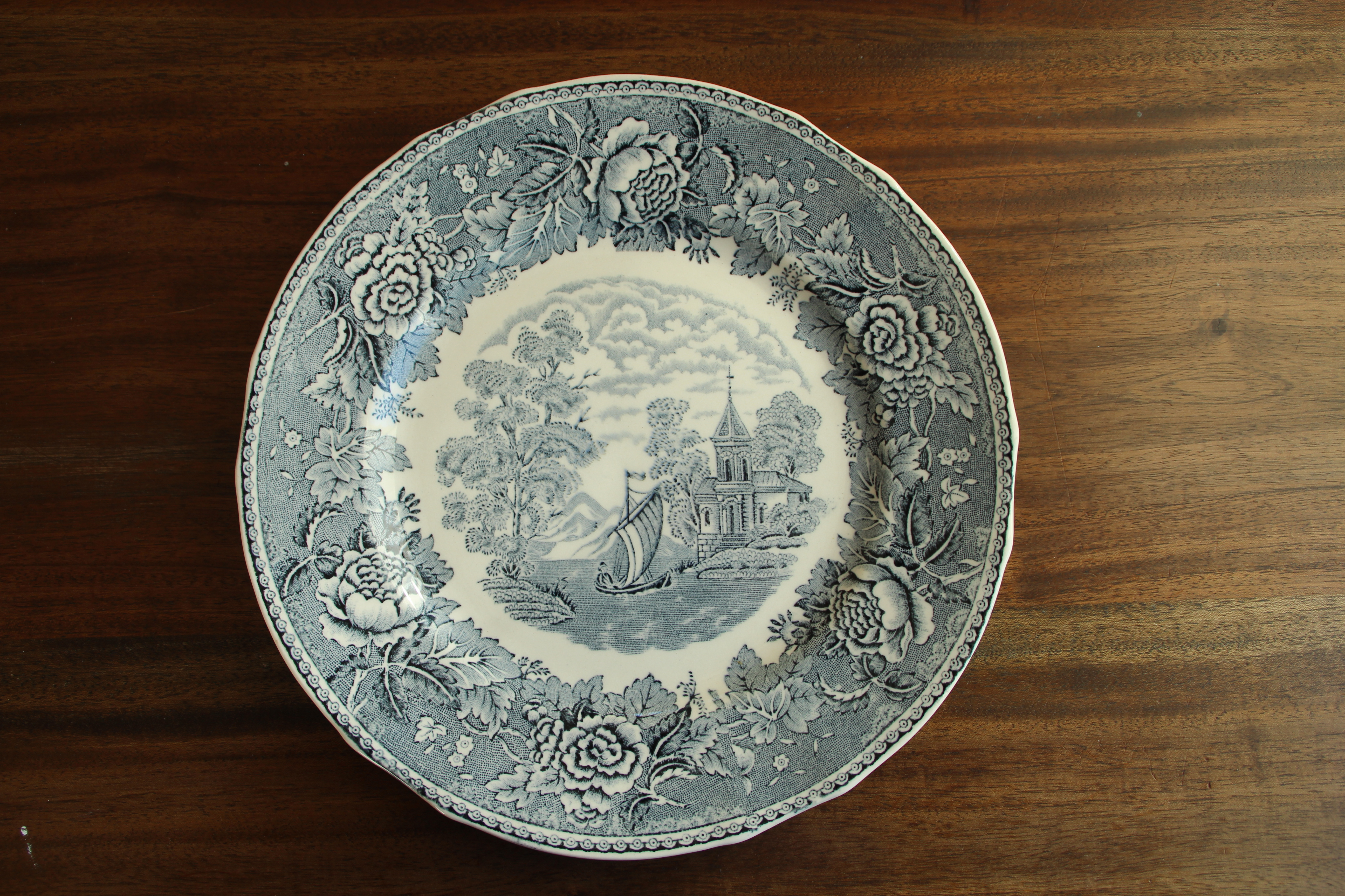 Arabia (Design)-Teller